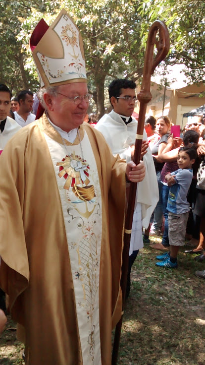 Obispo de Veracruz en el Seminario